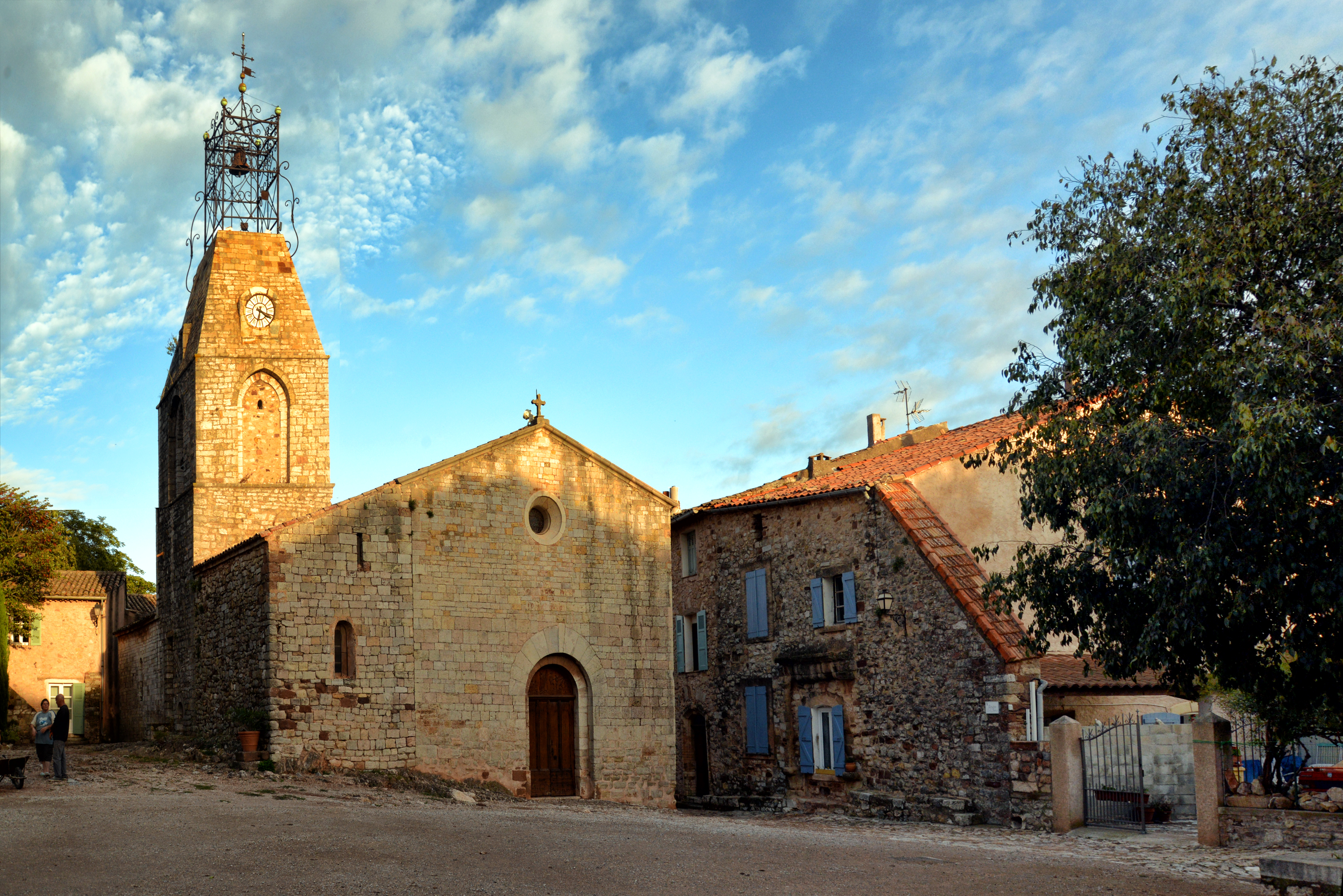 Le Cannet-des-Maures, Var (Provence) - La place du village avec l'église paroissiale Saint-Michel du Vieux-Cannet